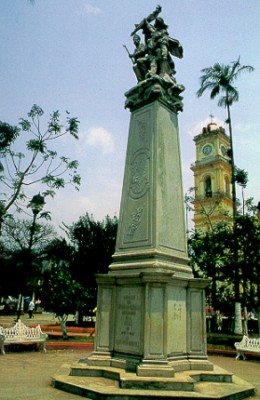 Estatua en memoria de los niños heroes, Frente a la Catedral de San Miguel Arcangel en el parque central Apolinar Castillo en Orizaba Veracruz.